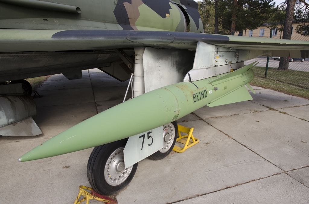 Blind Robot 05 (RB05).